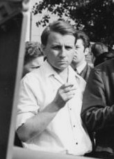 Title: Leipzig, Schriftsteller auf der "agra" People in the image: Reinowski, Werner: Schriftsteller, DDR * Heiduczek, Werner: Schriftsteller, DDR (GND 118992473) * Bräunig, Werner: Schriftsteller, Oberassistent am Johannes R. Becher Institut Leipzig, DDR Factual corrections and alternative descriptions are encouraged separately from the original description. Additionally errors can be reported at this page to inform the Bundesarchiv. Original historic description: Zentralbild Kluge 5.7.68 Leipzig: Schriftsteller auf der "agra" Eine Gruppe von Schriftstellern und Studenten des Literaturinstituts "Johannes R. Becher" in Leipzig besuchte am 4.7.68 die "agra 68". Unser Foto zeigt v.l.n.r. Werner Bräunig, Dr. Jochen Schäfers, Sekretär des Deutschen Schriftstellerverbandes, Werner Haiduczek und Werner Reinowski. Diese Besichtigung der Landwirtschaftsausstellung, der scih Aussprachen mit Landwirtschaftsexperten anschließen, setzt das in Neuholland begonnene Gespräch über Probleme der modernen Landwirtschaft fort.